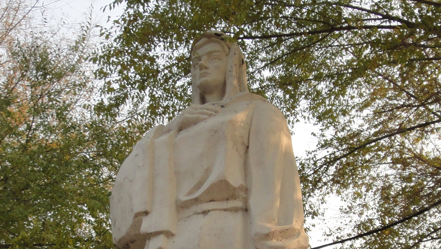 Мемориал работникам локомотивного депо, погибшим в годы В. О.В. (у здания музея истории локомотивного депо Иркутск-Сортировочный). Мемориал представляет собой скульптуру, олицетворяющую «Родину-мать», стелу с барельефами и стелу с текстом: «Никто не забыт, ничто не забыто» и макетом ордена Отечественной войны. На фотографии часть скульптуры "Родина-мать".